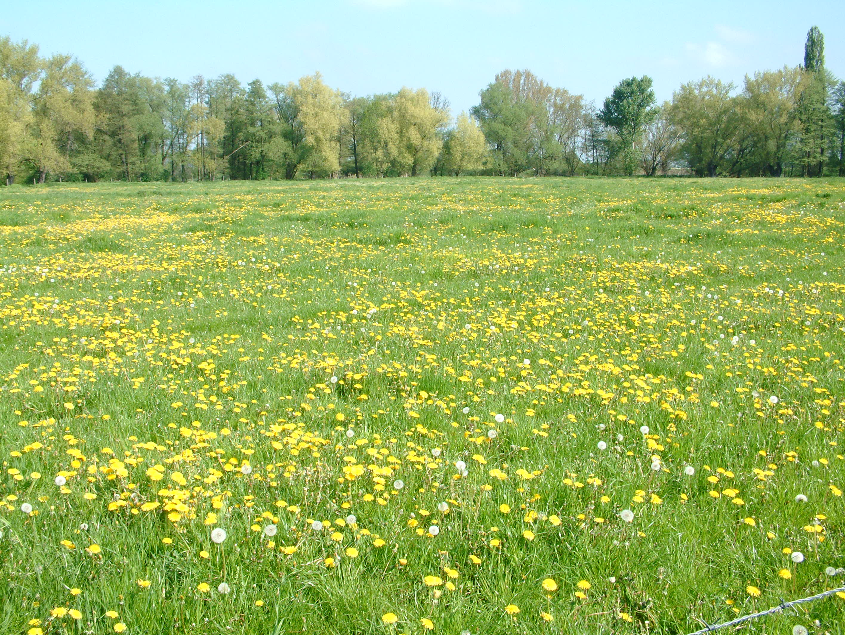 Wiesenlandschaft an der Bode zwischen Gröningen und Kloster Gröningen